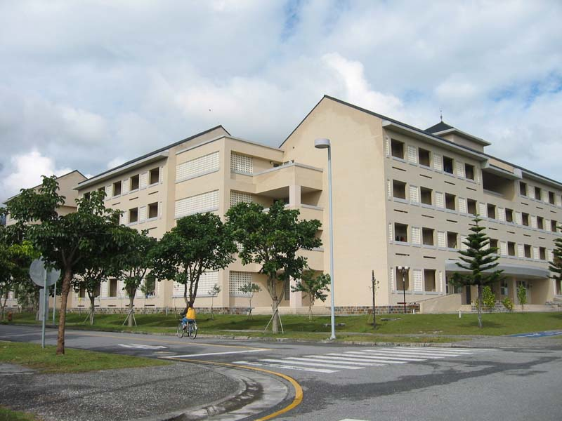 國立東華大學女學生宿舍涵星一莊。